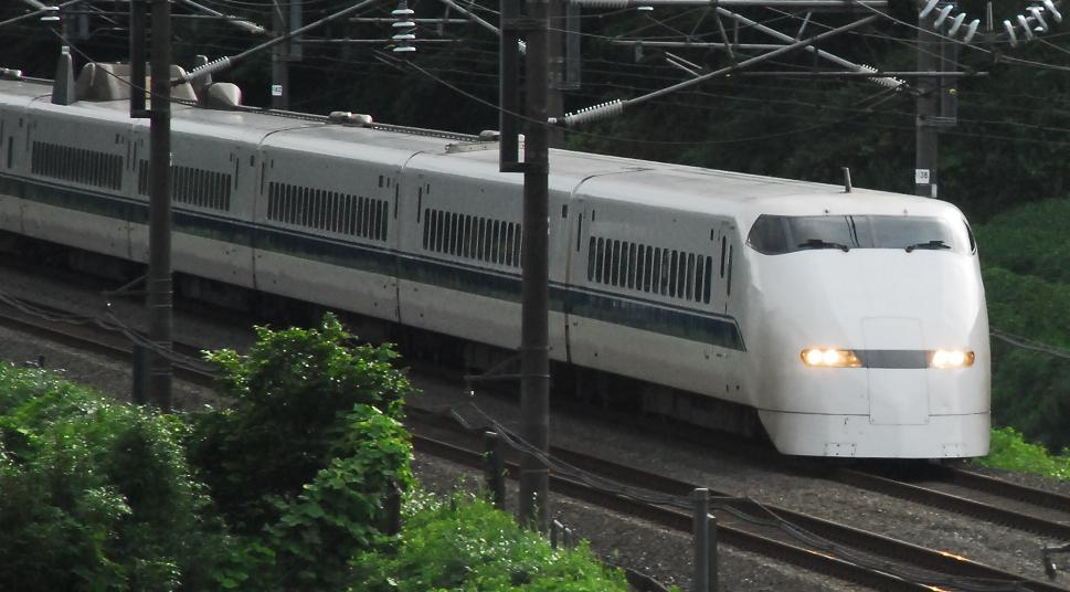 新幹線300系電車ja:category:新幹線画像 撮影者：take-y